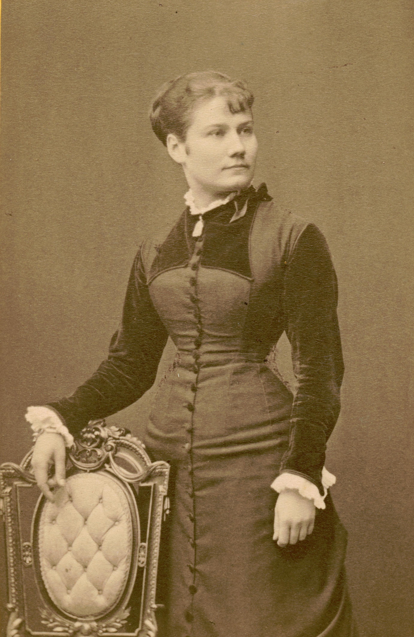 Skådespelaren Thecla Åhlander som Nora i Ett dockhem vid Dramaten 1880